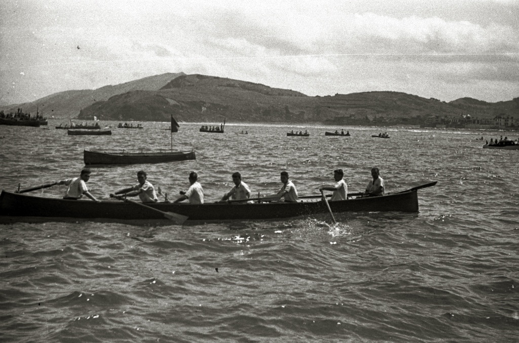 Título original: Regatas de traineras en la costa de Zarautz (6/8) Localización: Zarauz (Guipúzcoa)